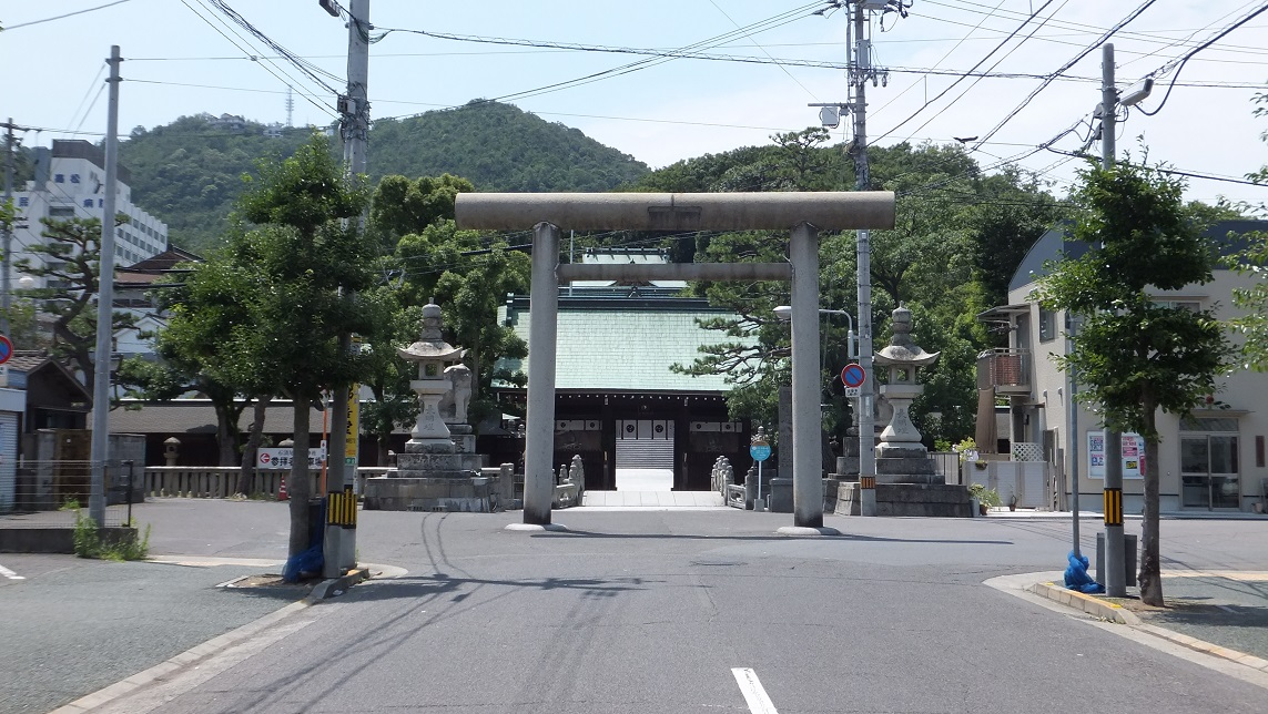 香川県高松市の石清尾八幡宮正面。鳥居と隋神門。